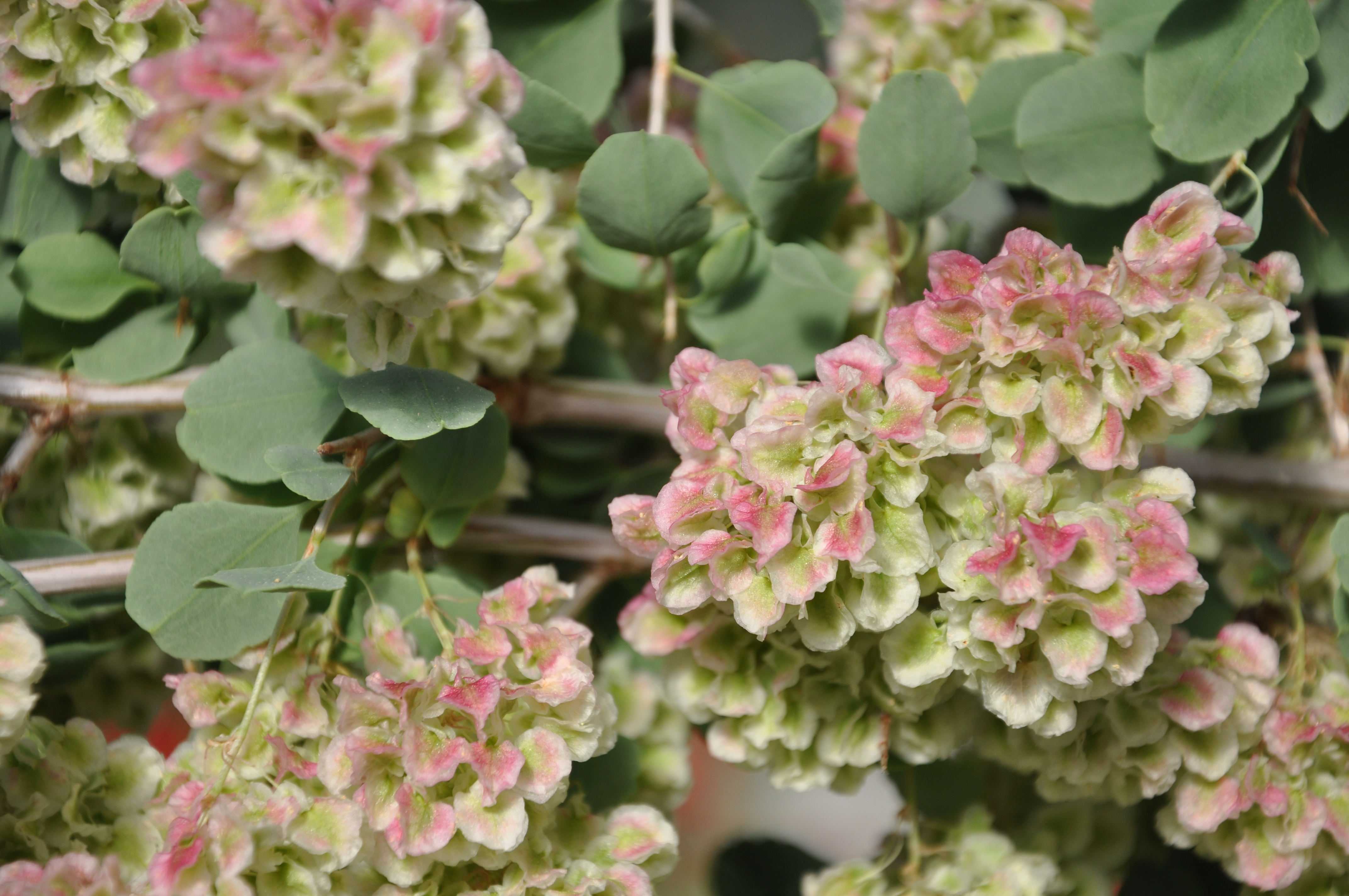 Atraphaxis pyrifolia Bunge, 1851